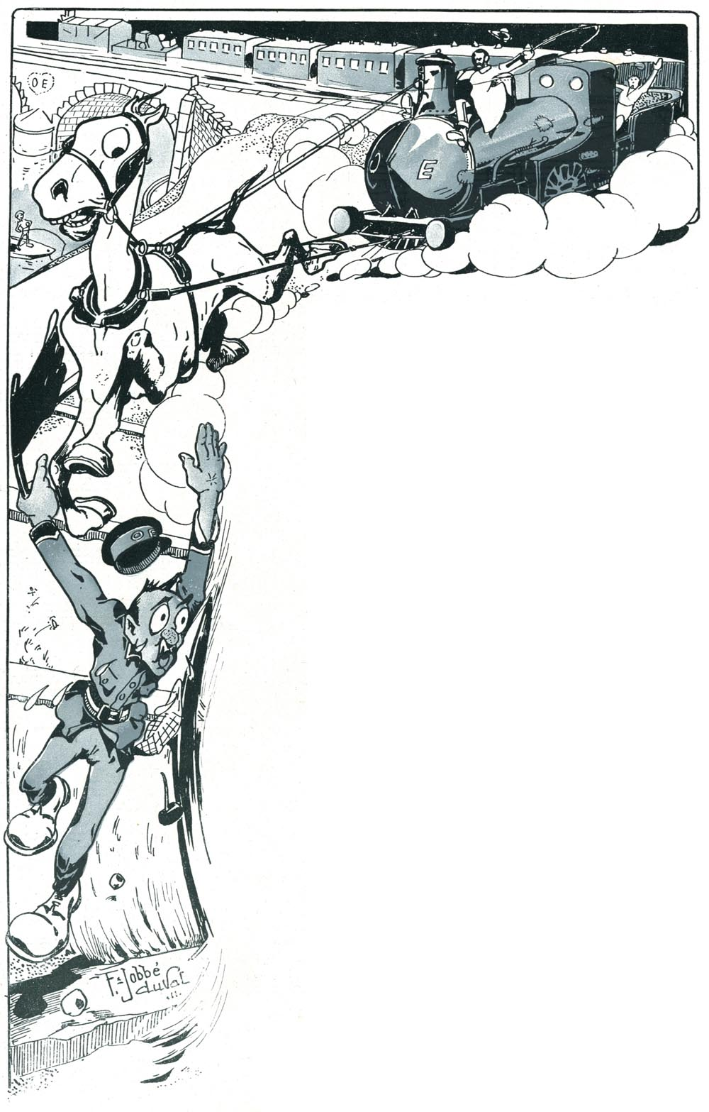 Illustration pour une chanson de Dominique Bonneau.